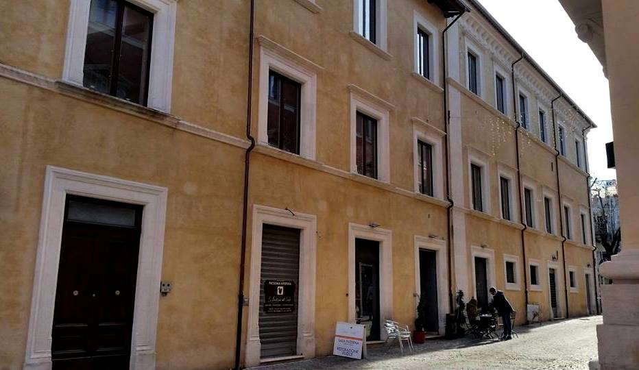 Palazzo Lucentini Bonanni in L'Aquila.